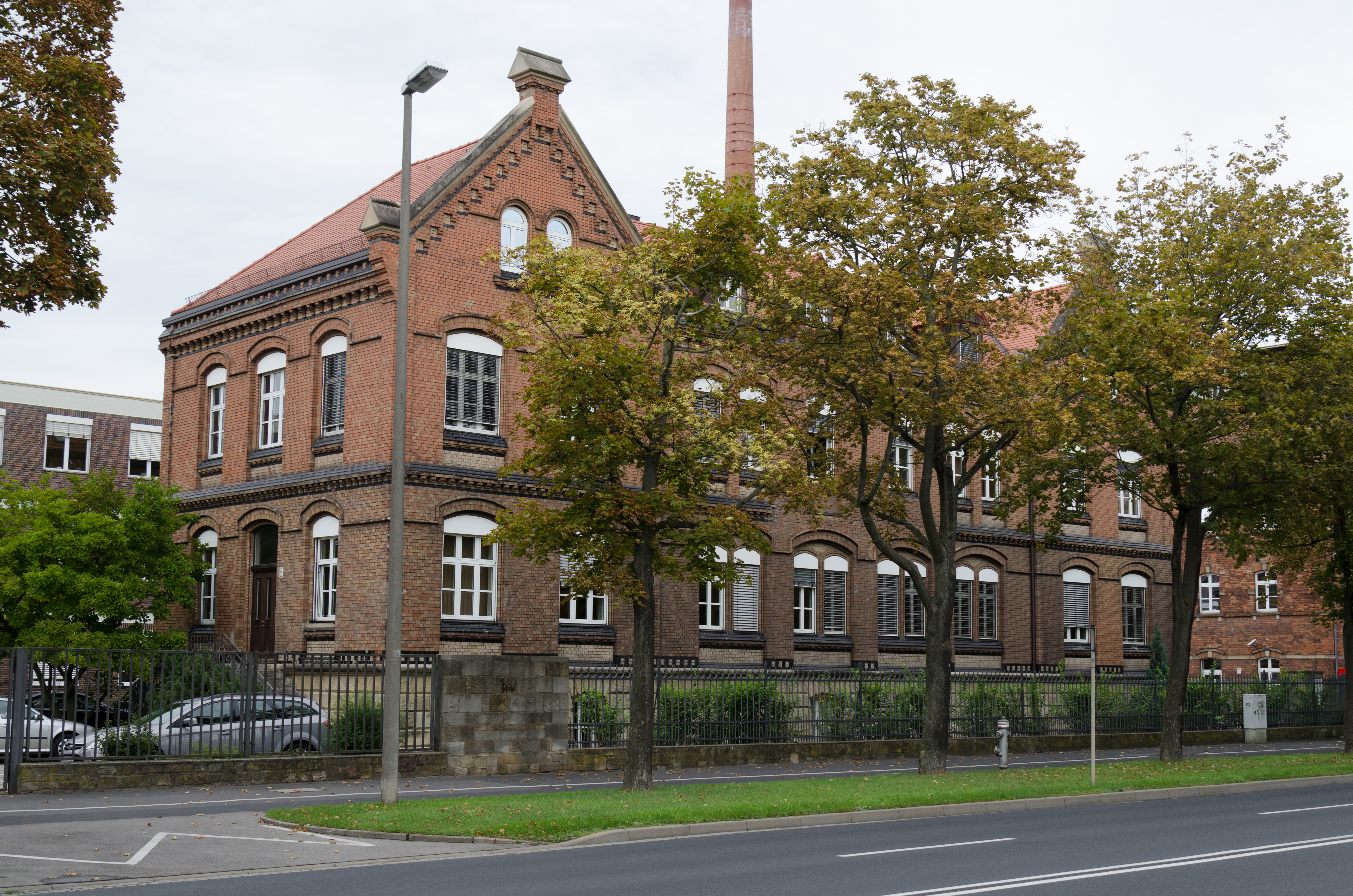 Schweinfurt, Hauptbahnhofstraße 12